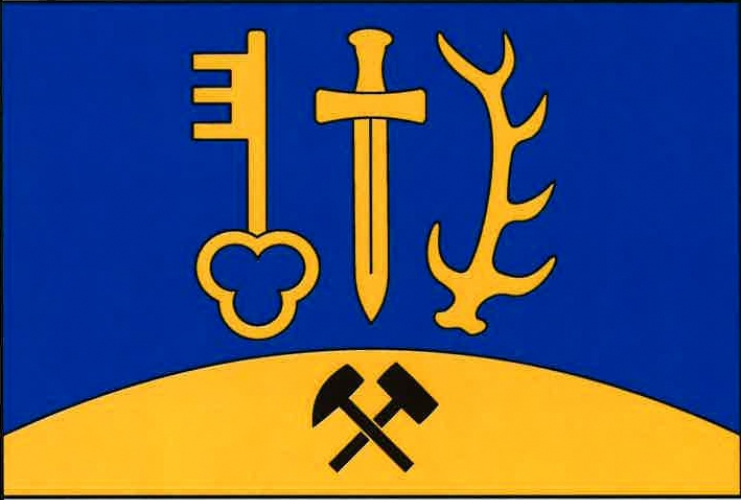 Vlajka, Rančířov, okres Jihlava